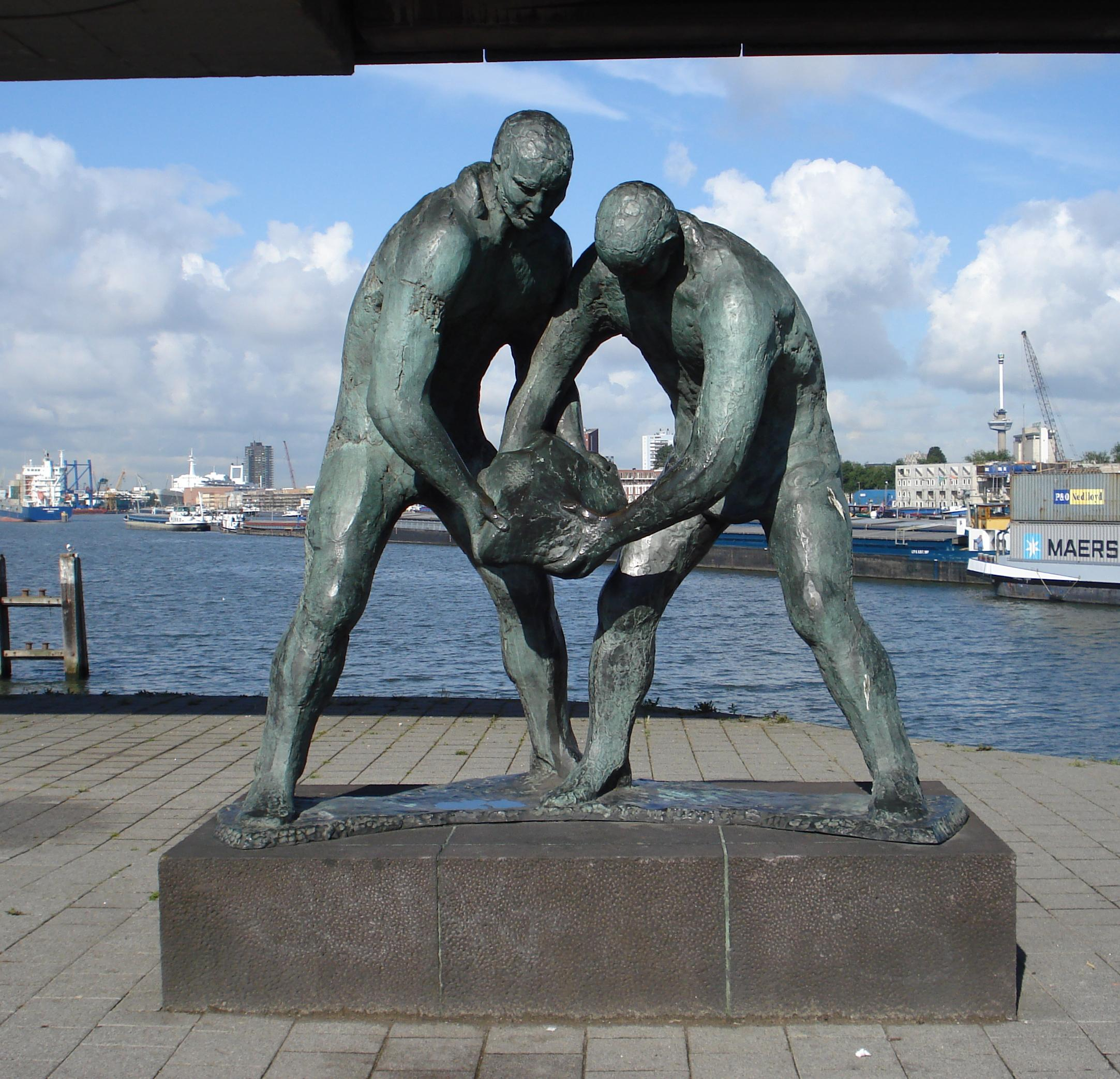 Rotterdam Maashaven, Kunstwerk "De Dijkwerkers" van Ek van Zanten. Rotterdam/The Netherlands.